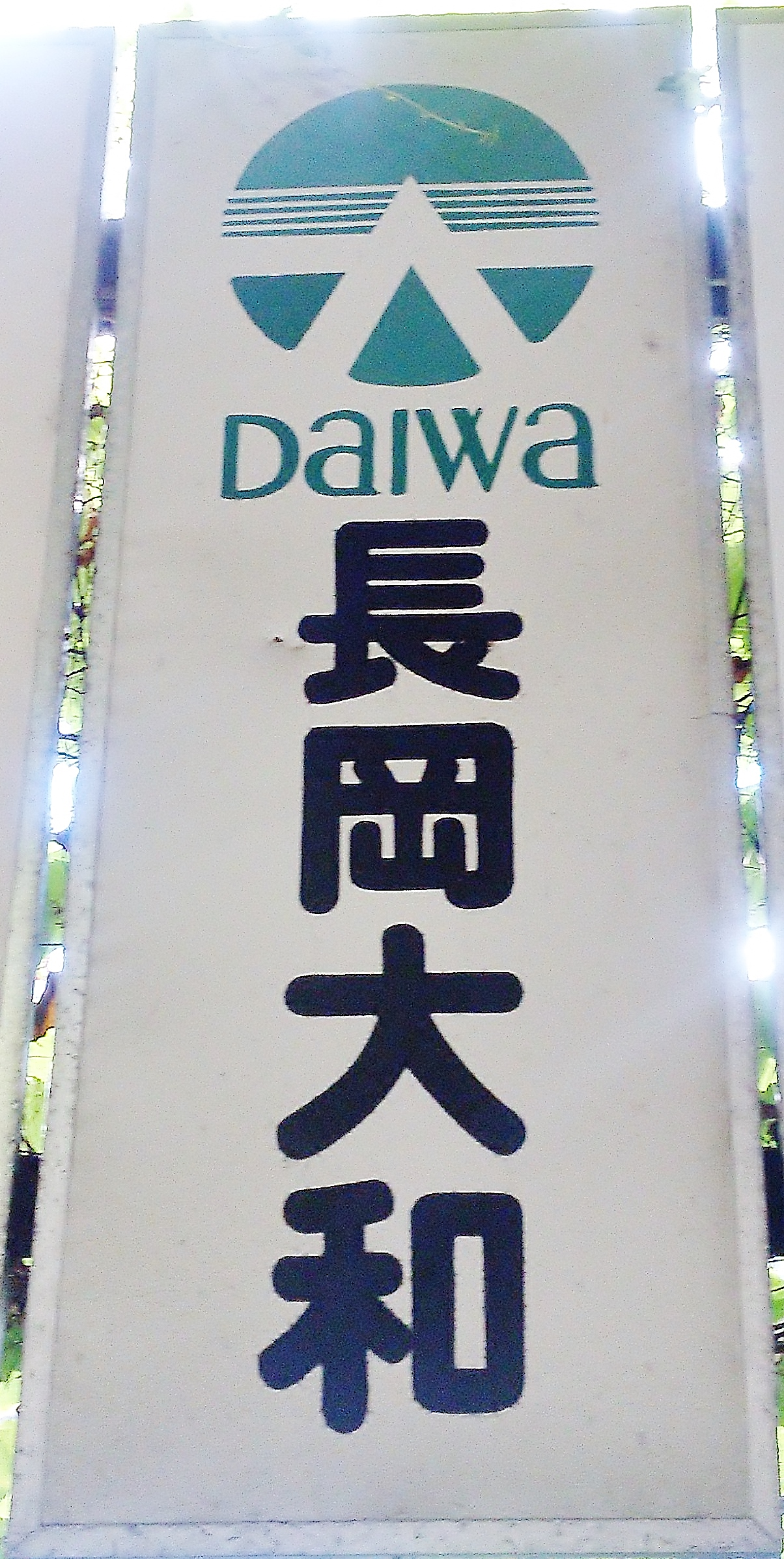 新潟県 長岡市 にて撮影